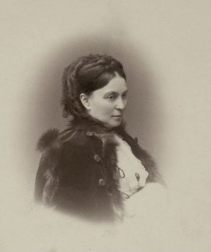 Адлерберг Екатерина Николаевна